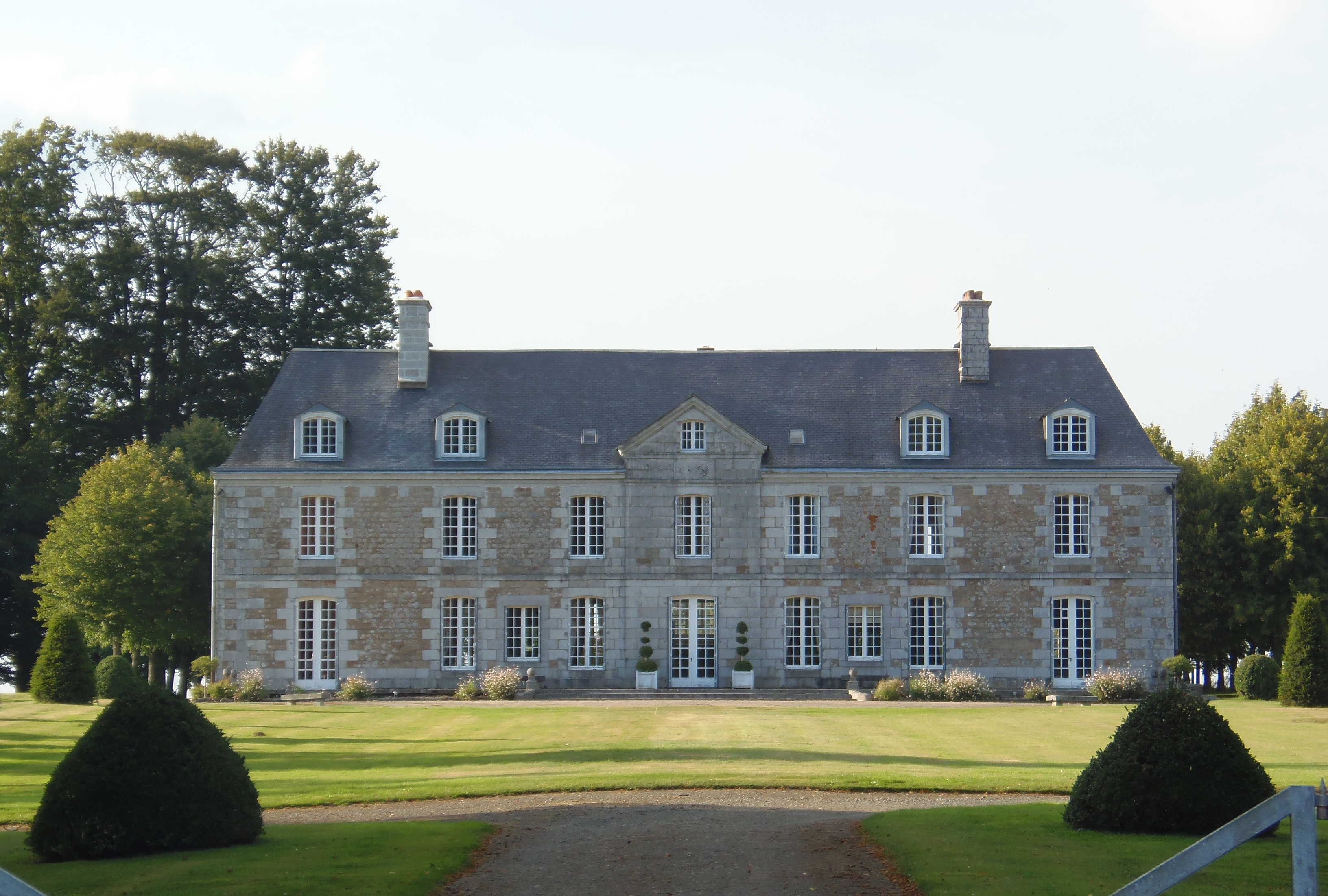 Saint-Sever-Calvados (Normandie, France). Le château de la Braiserie.